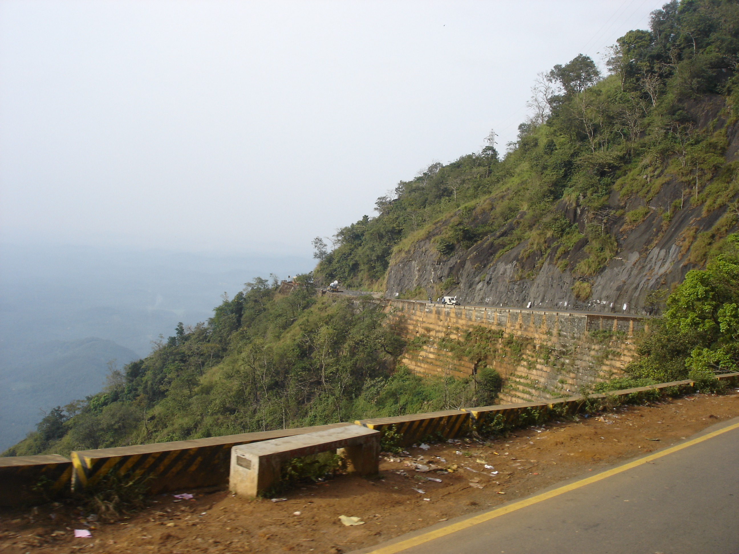 കോഴിക്കോട്-മൈസൂർ ദേശീയപാതയിൽ അടിവാരം മുതൽ ലക്കിടി വരെയുള്ള ഭാഗമാണ്‌ വയനാട് ചുരം (താമരശേരി ചുരം) എന്ന് അറിയപ്പെടുന്നത്. വയനാട് ചുരത്തിലെ കാനനദൃശ്യങ്ങൾ മനോഹരമാണ്‌. 9 ഹെയർ പിൻ വളവുകളുള്ള വയനാട് ചുരം വിനോദ സഞ്ചാരികളുടെ പ്രധാന ആകർഷണകേന്ദമാണ്‌.